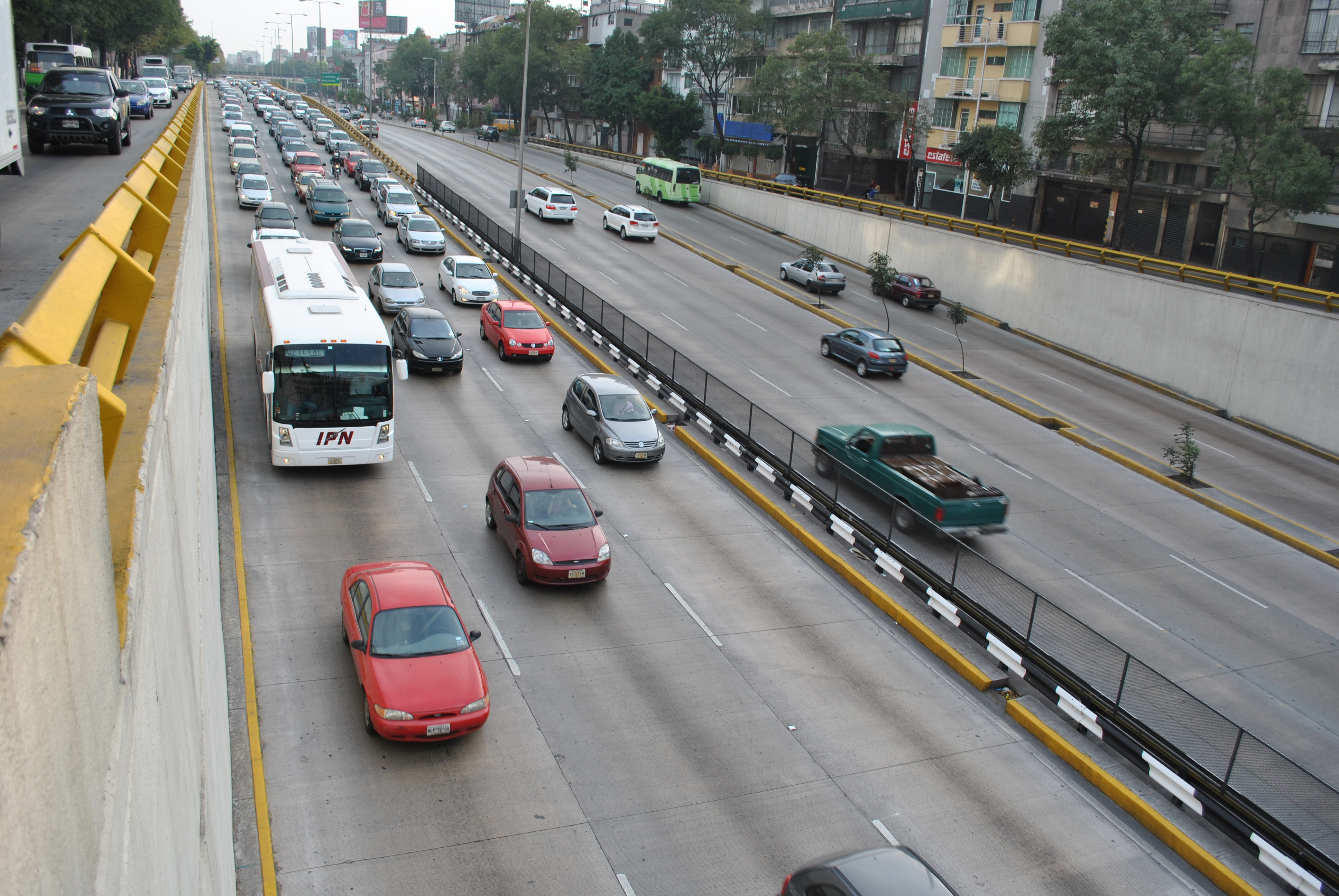 Circuito Interior Bicentenario, a la altura de Paseo de la Reforma.